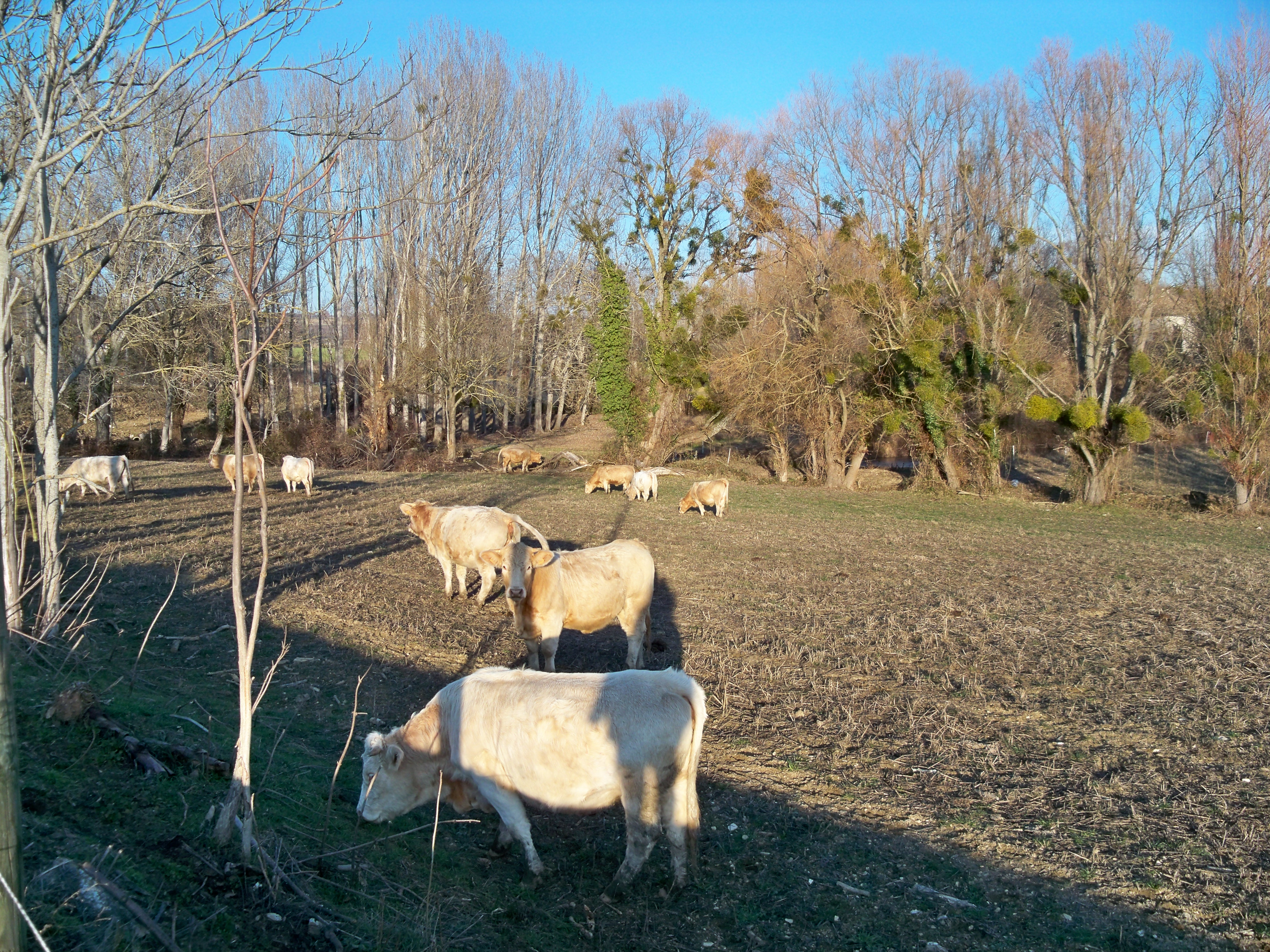 troupeau de vaches près de Montjustin (04), France